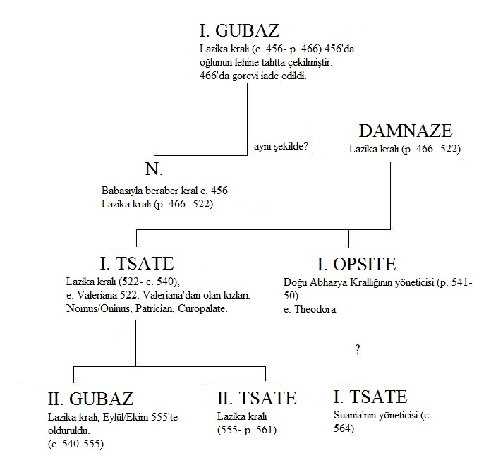 Toumanoff'a göre Lazika krallarının seçeresi